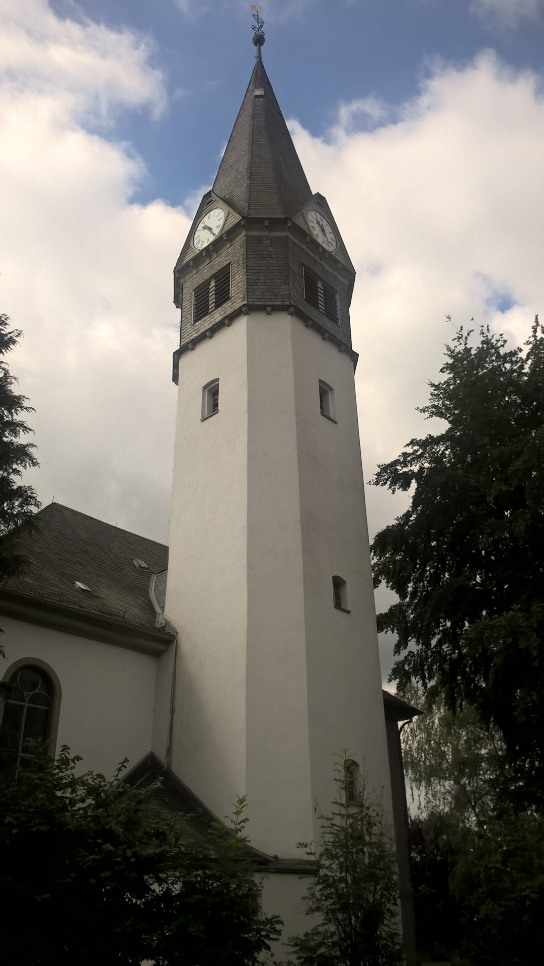 Evangelische Kirche Atzbach, Lahnau, Lahn-Dill-Kreis, Hessen, Deutschland